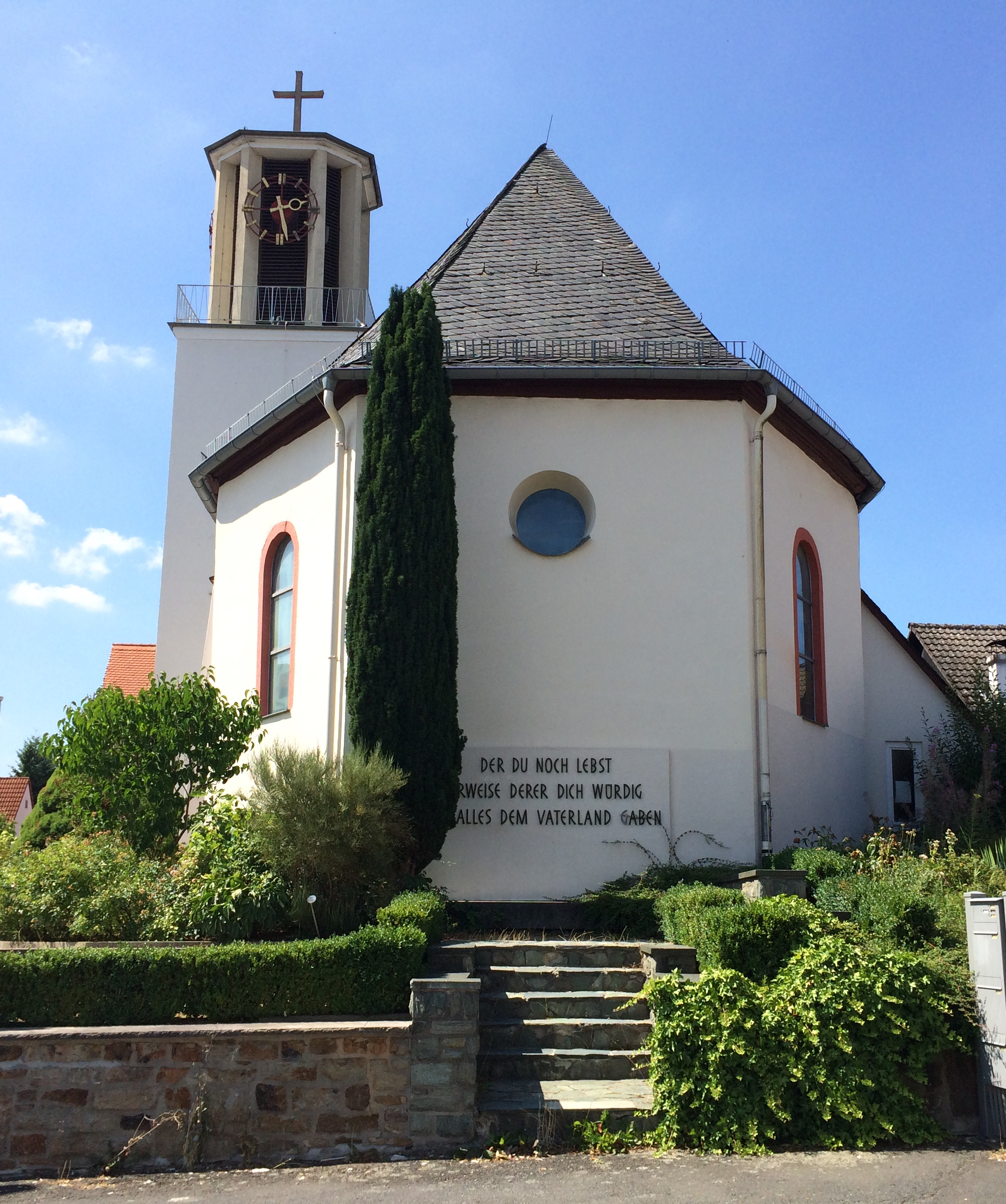 Evangelische Kirche Oberstedten. Hier fanden die ersten Konzerte der Reihe Klassik im Taunus statt.